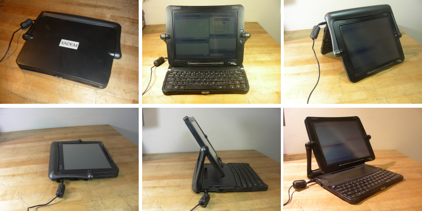 Vadem Clio